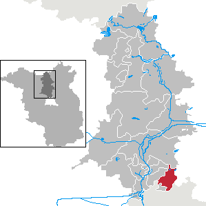 Mühlenbecker Land in Brandenburg (Country) - District Oberhavel